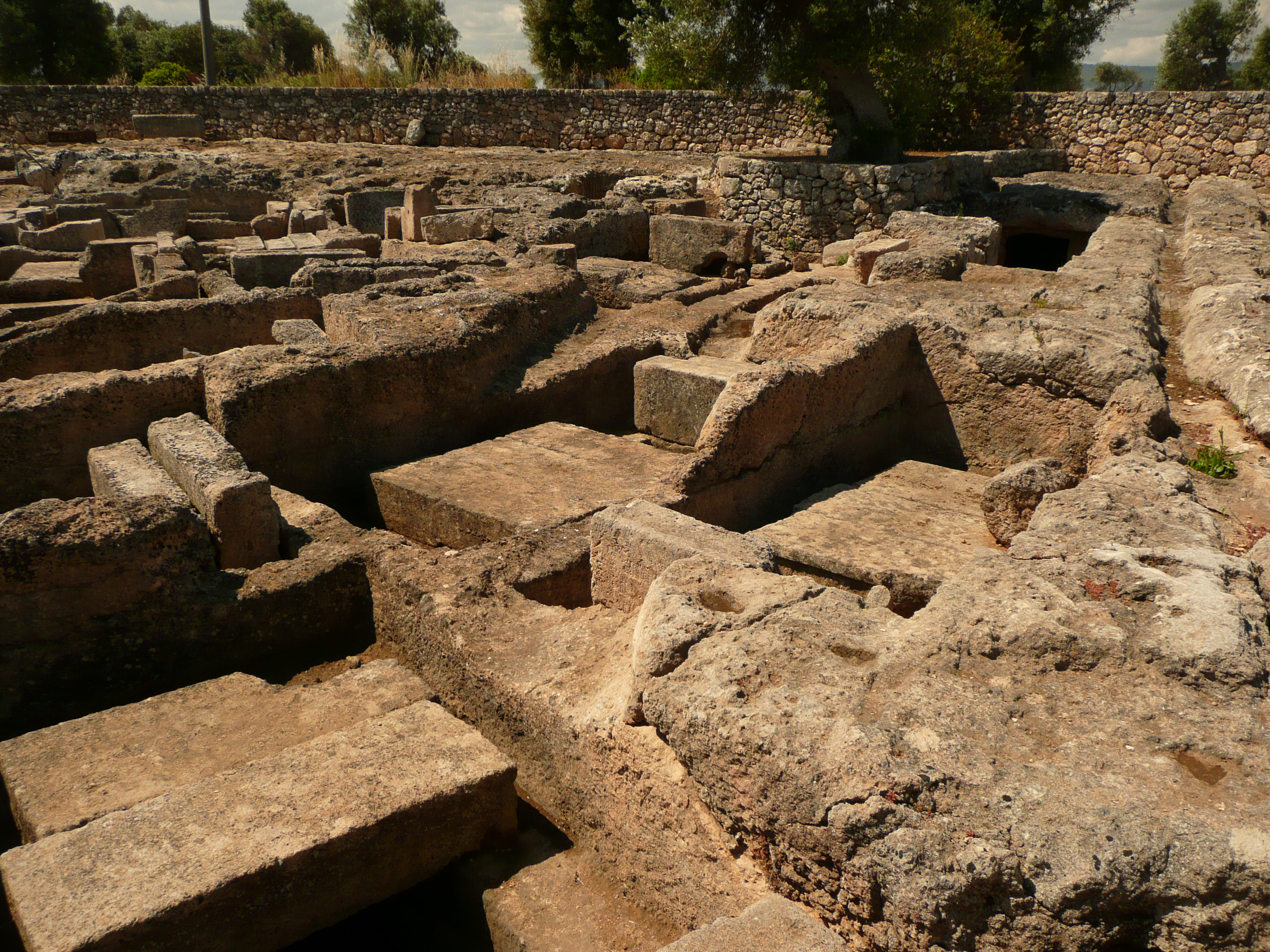 Parque arqueológico de Egnazia, Apulia.